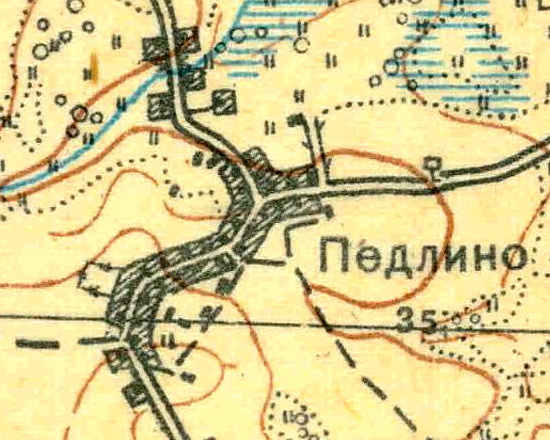 Топографическая карта Ленинградской области, квадрат О-35-24-Б-г (Б. Борницы), деревня Педлино